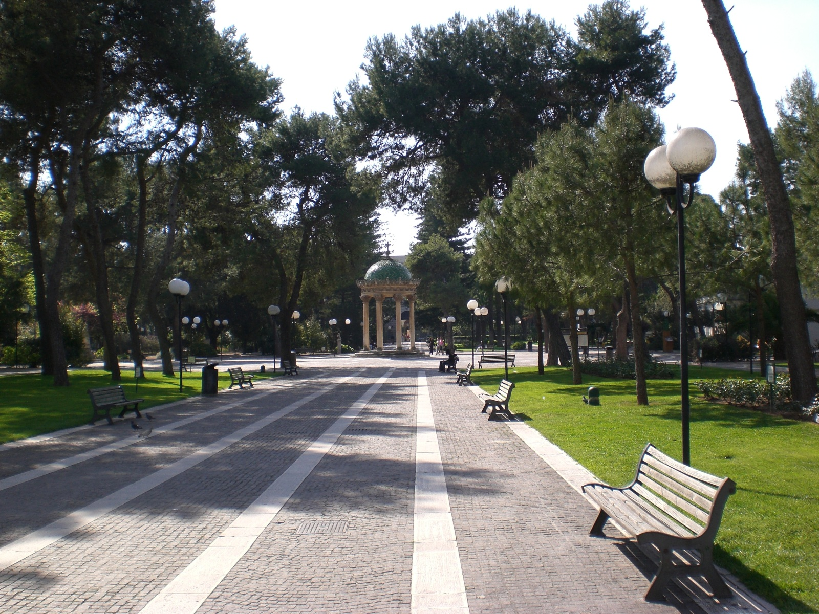 Entrata della Villa Comunale di Lecce